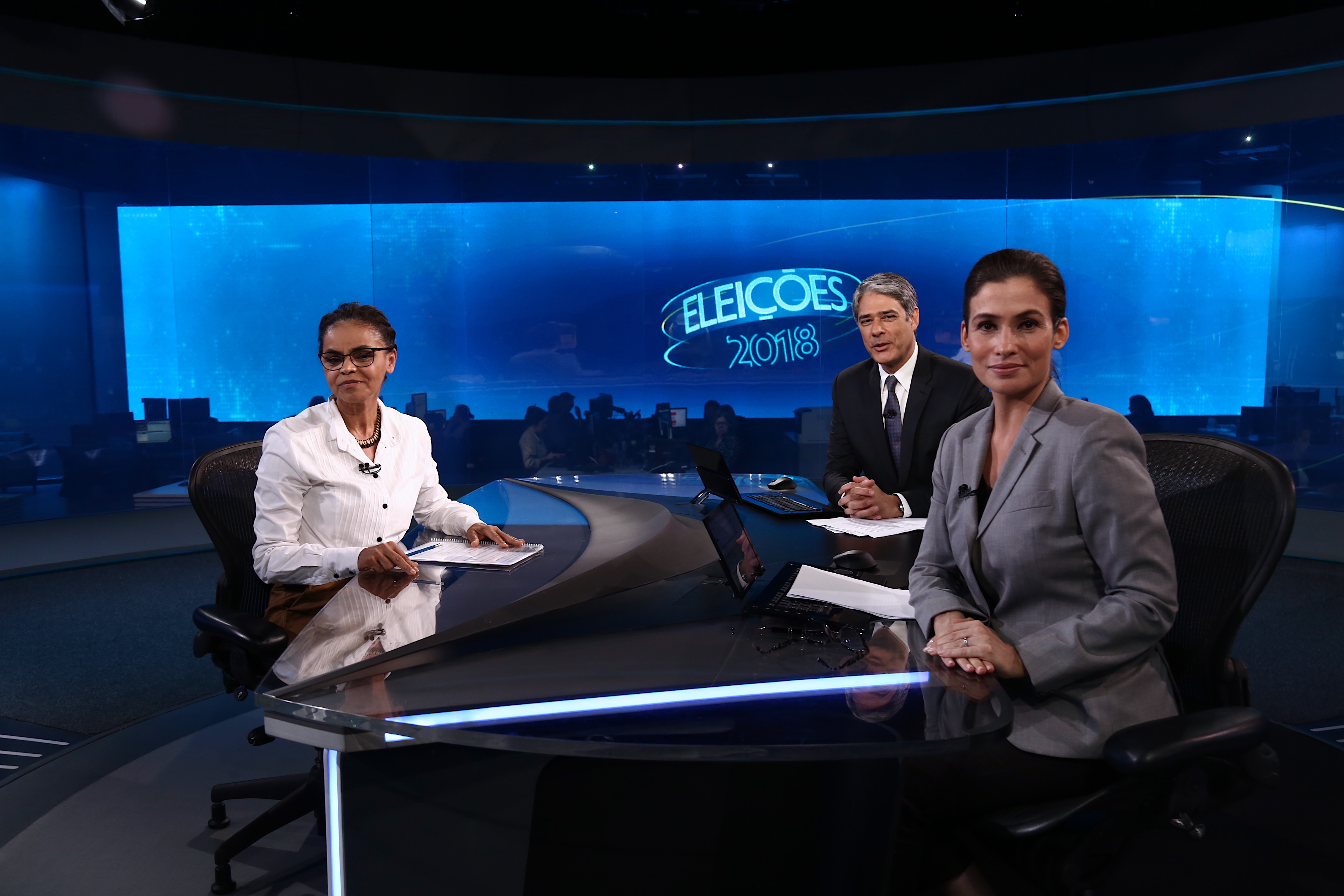 Marina Silva, Renata Vasconcellos e William Bonner em agosto de 2018.